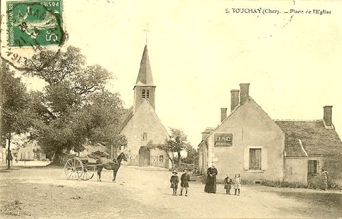 Carte postale ancienne de la place de Touchay. Cette carte a servi de modèle pour l'oeuvre de Maurice Utrillo